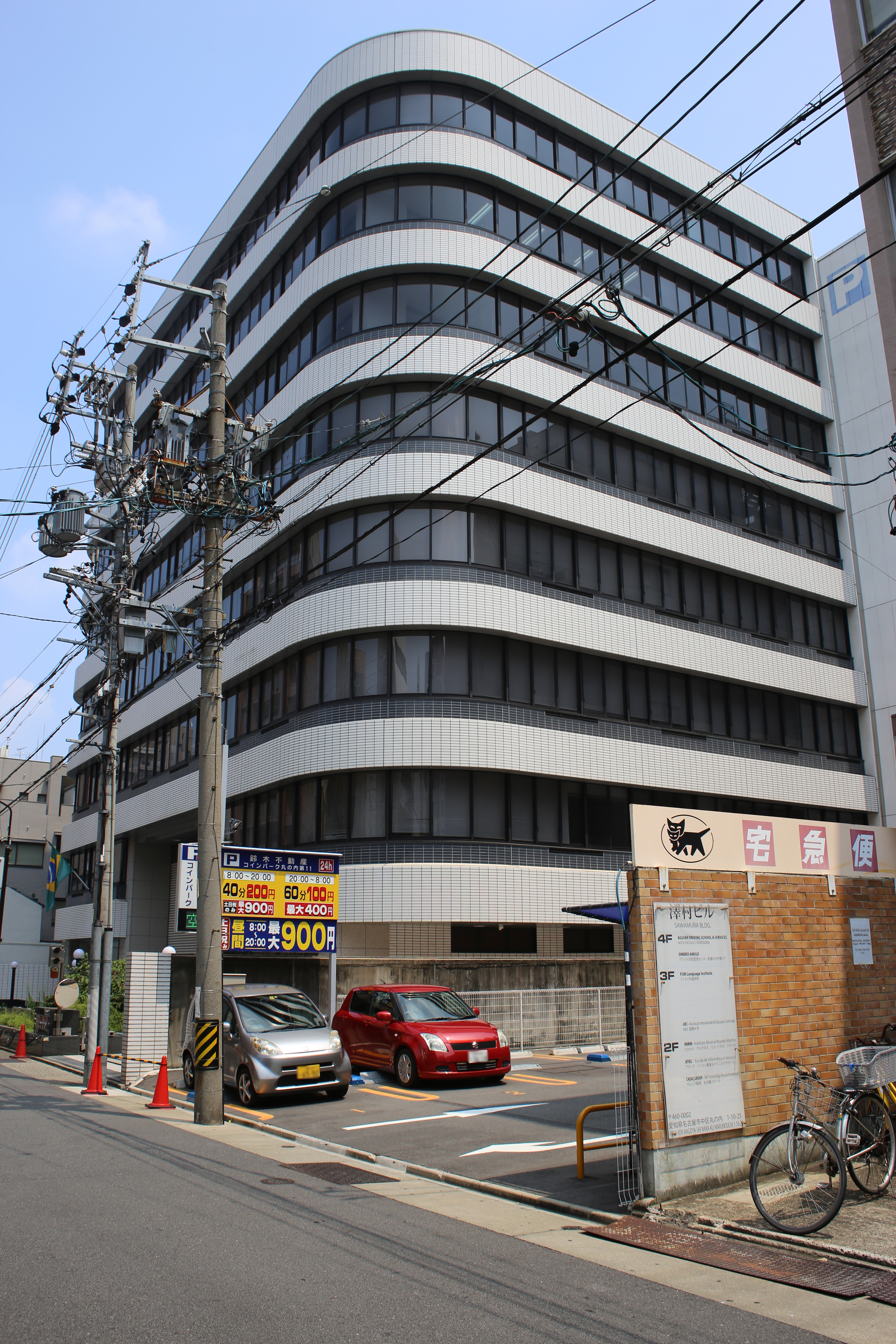 名古屋市中区丸の内一丁目の白川第8ビルを西側公道南側より撮影。ただし、ナンバープレートにつき画像処理済。